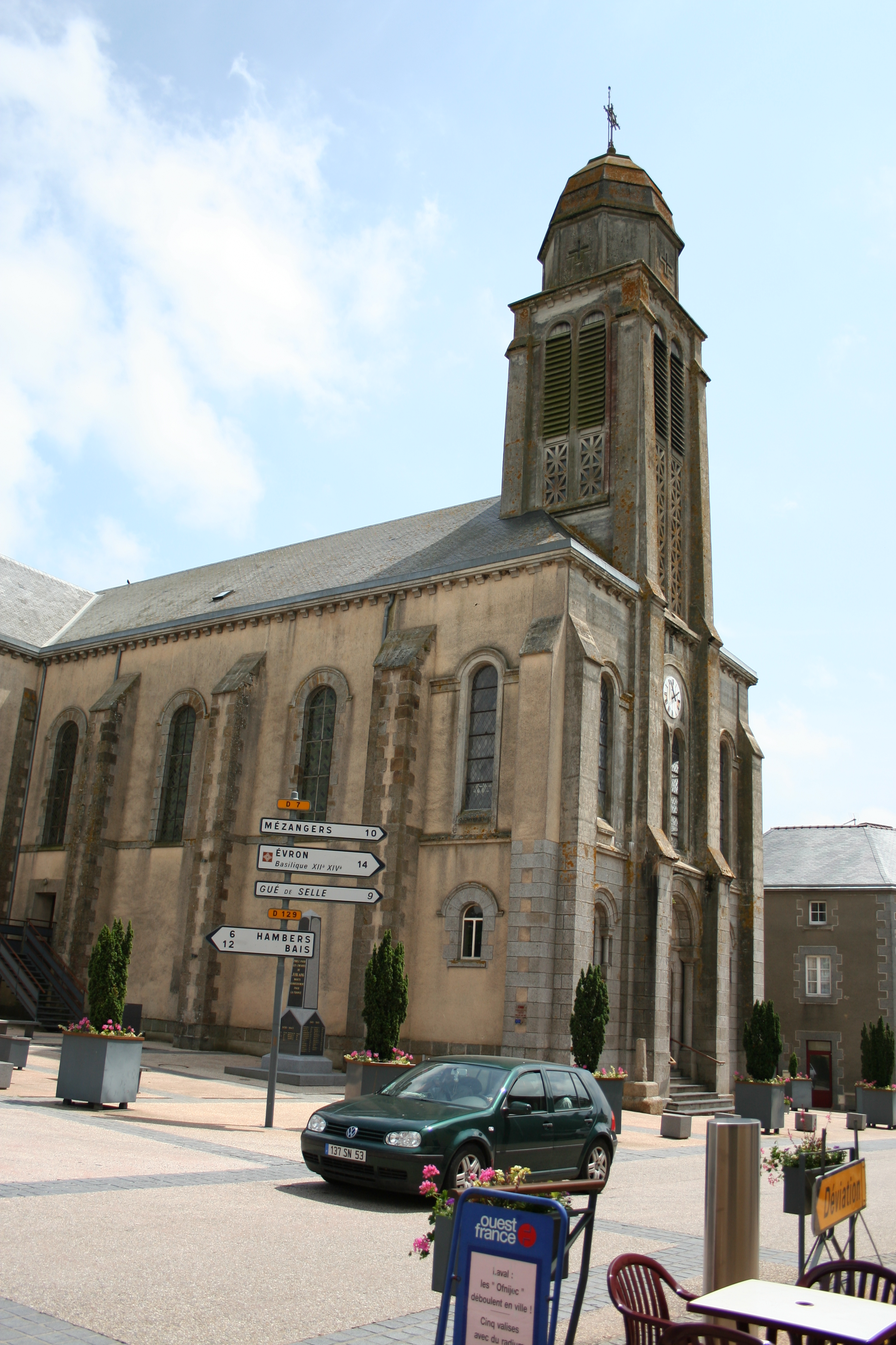 Eglise de Jublains, Mayenne (contient les vestiges de thermes de l'ancienne cité des Diablintes Aulerques)